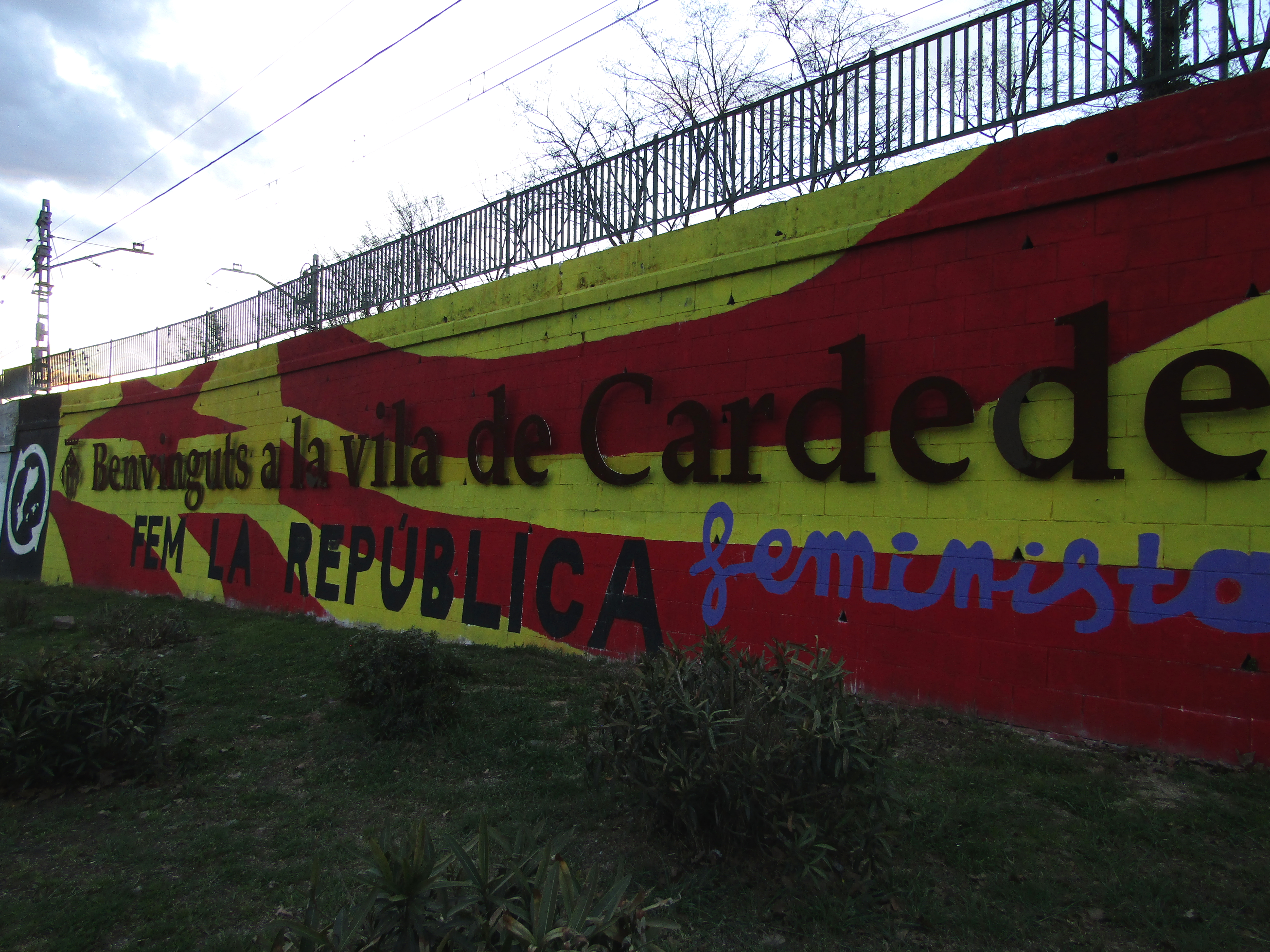 Mural a l'entrada de Cardedeu a març de 2018